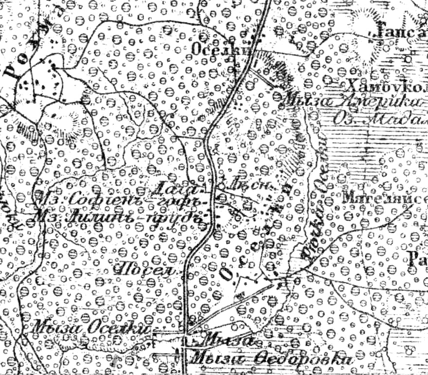 План деревень Осельки. 1914 г.